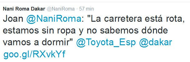 Tweet de Nani Roma durante el Dakar 2017. 9 de enero 2017